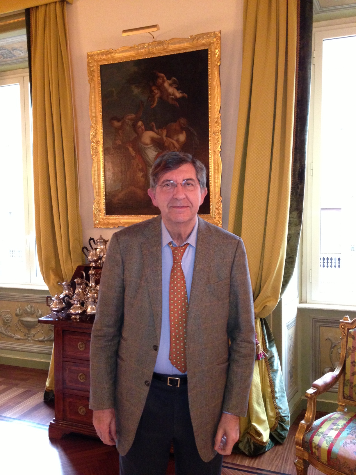 Enzo Musco